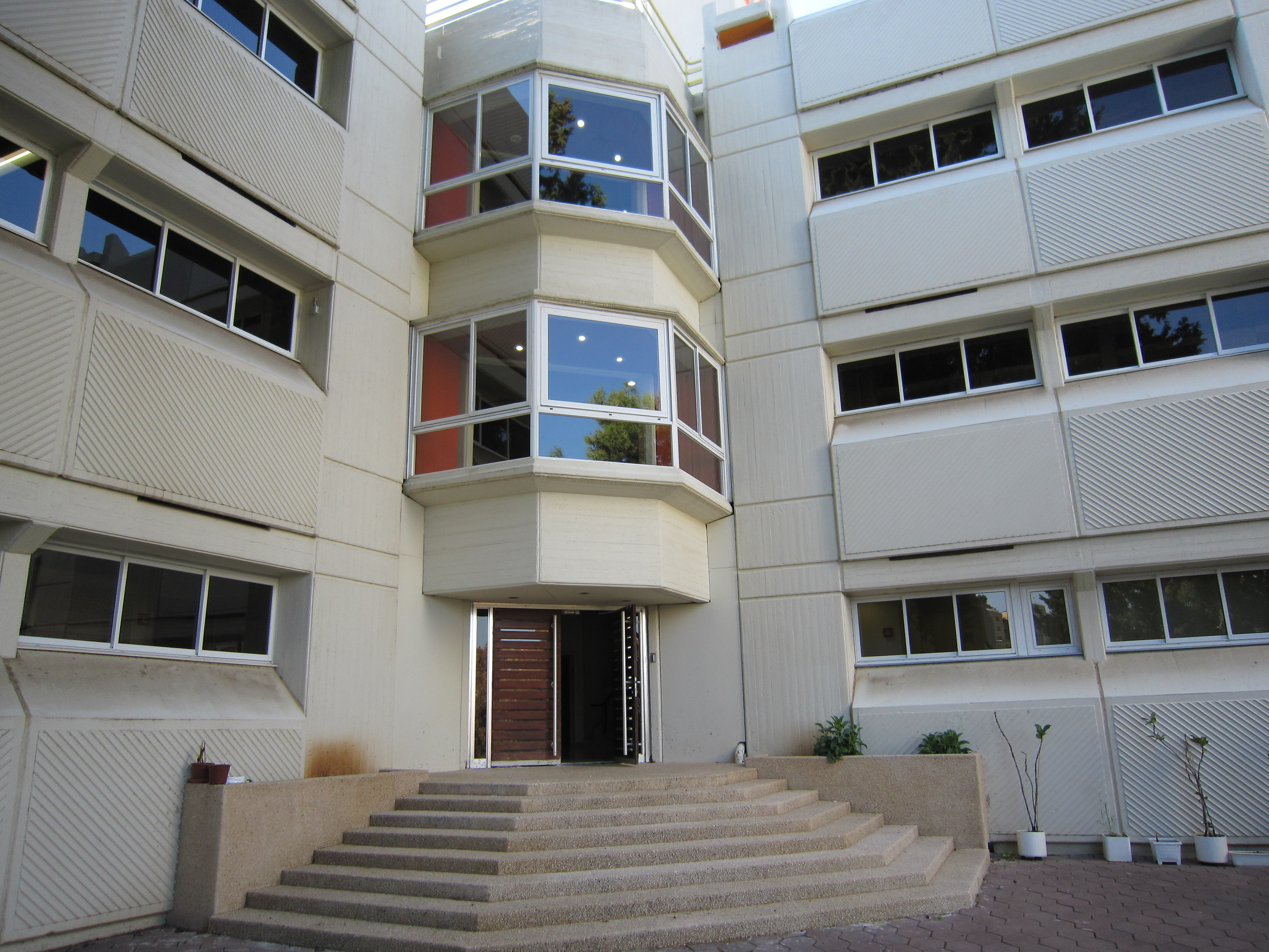 בניין הפקולטה להנדסה ביורפואית בטכניון